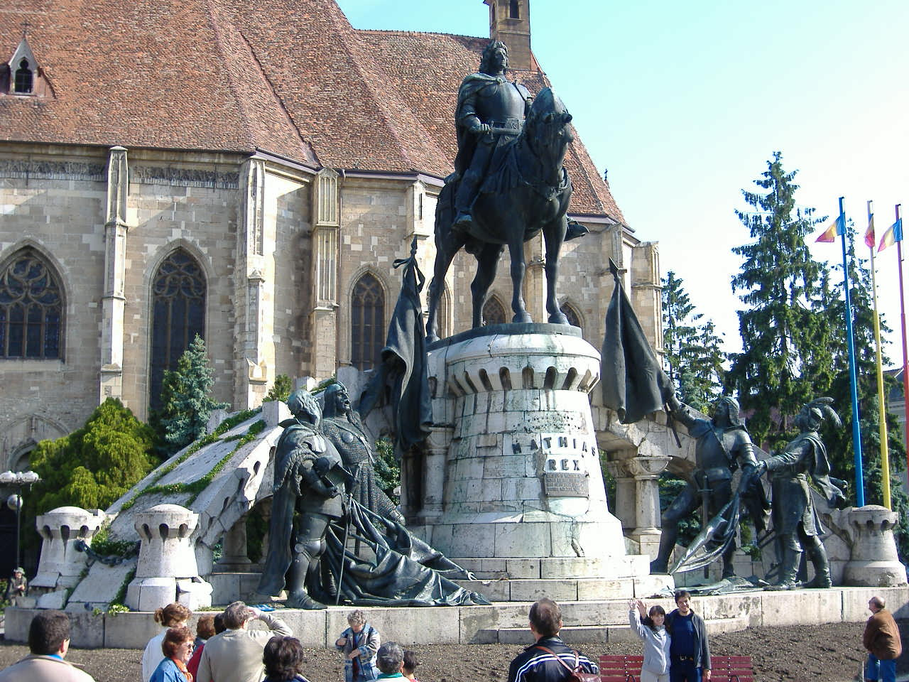 Mátyás király szobra Kolozsvárott